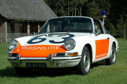 912 Targa van de Nederlandse rijkspolitie (foto Erik van Kampen, niet beschermd door auteursrecht, vrij te gebruiken)